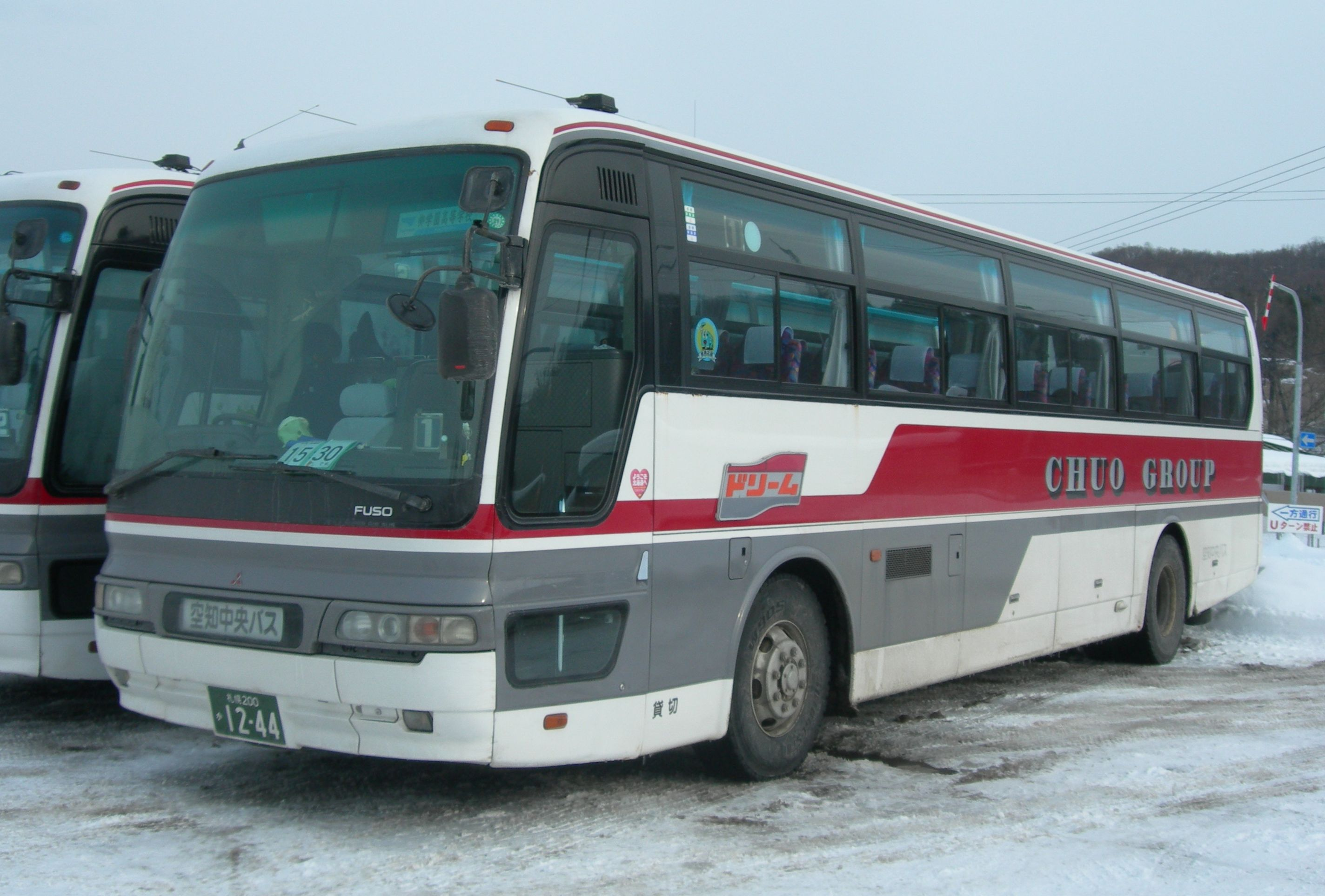 Sorachi Chūō Bus car 空知中央バス 貸切バス